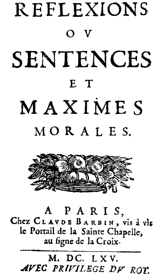 Frontispiece of Reflexions ou Sentences et Maximes Morales by François de La Rochefoucauld (1613-1680)